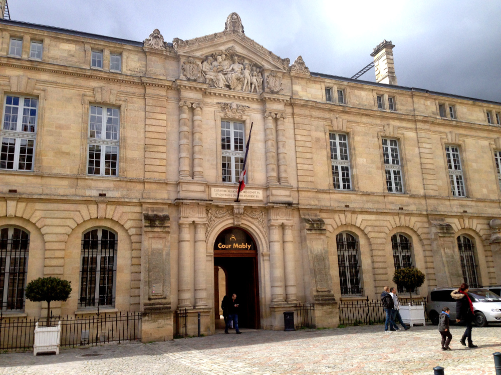 Cour Mably, à Bordeaux, siège de la chambre régionale des comptes d'Aquitaine, Poitou-Charentes